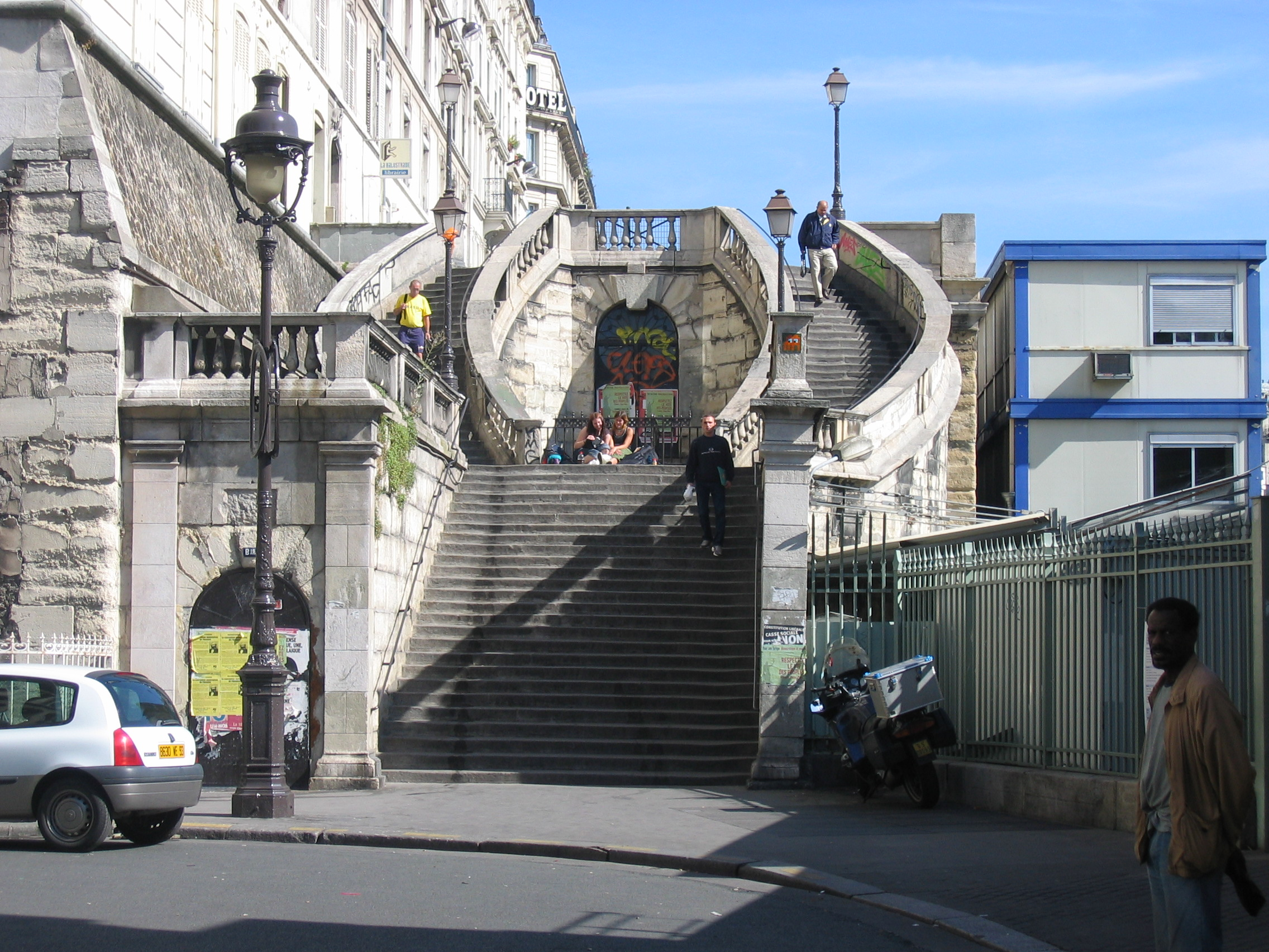 Treppen an der Gare de l´Est.